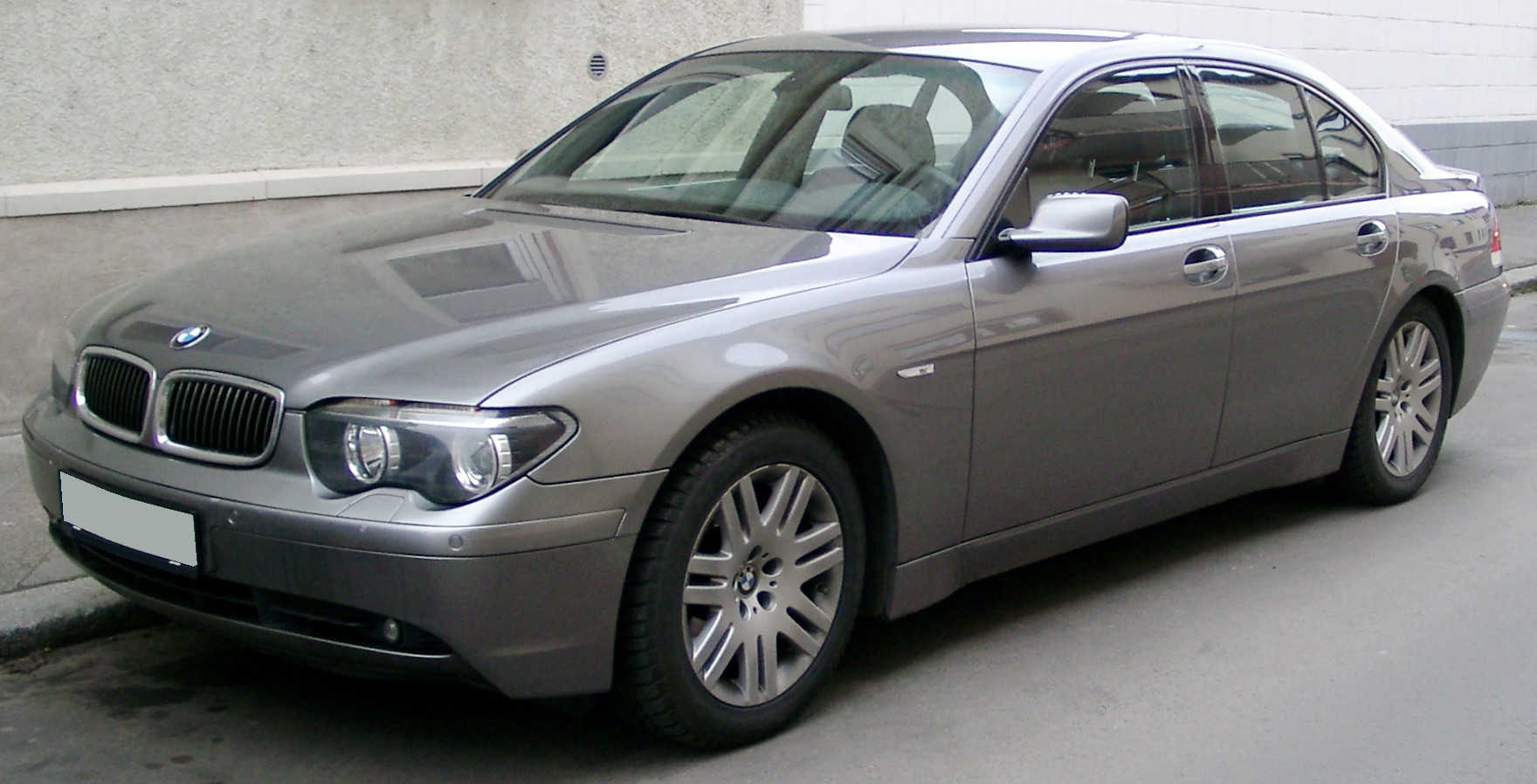 BMW E65